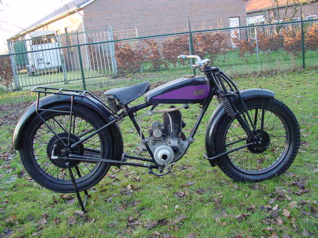 Toestemming van Yesterdays Antique Motorcycles (